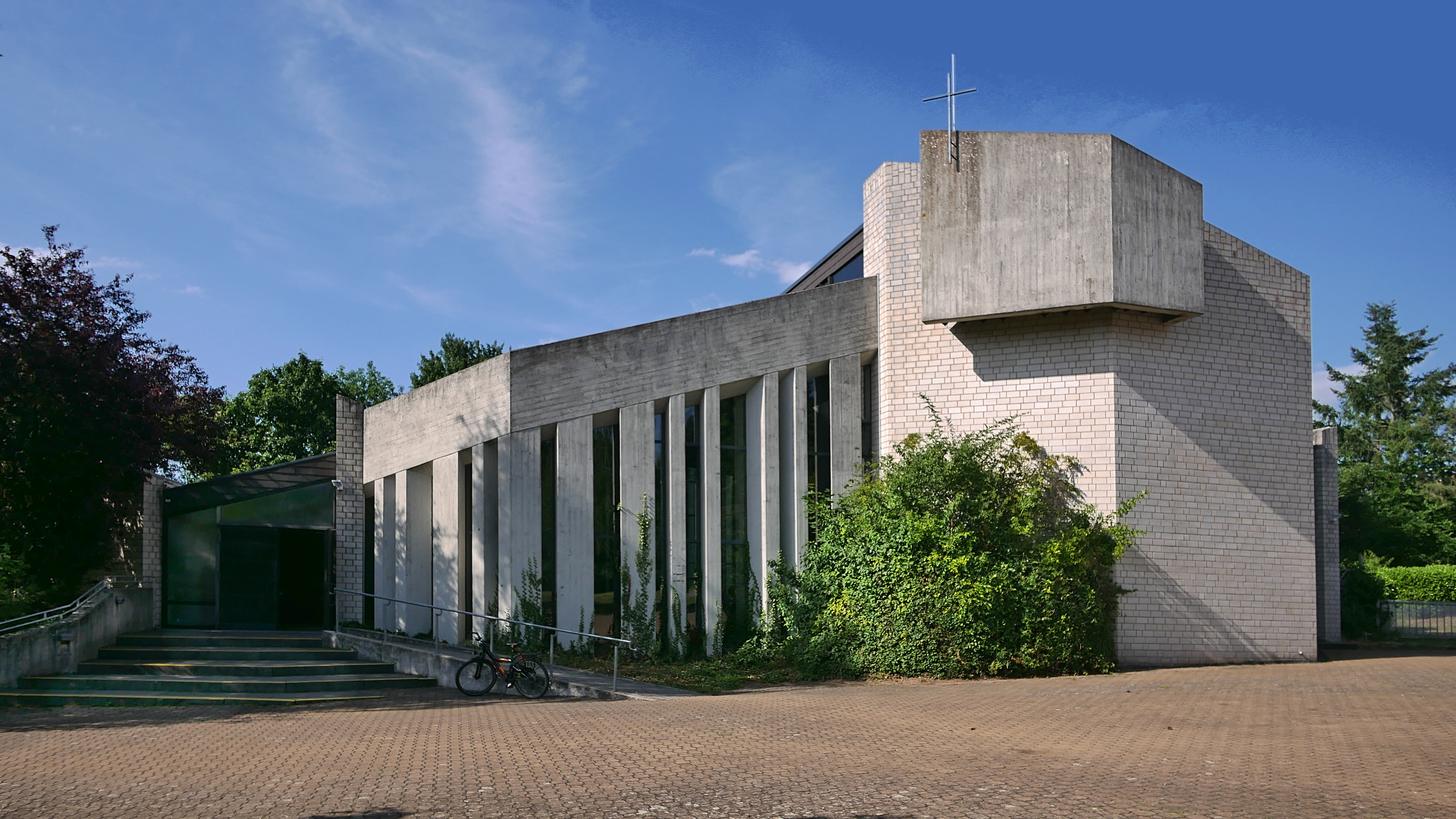 Katholische Kirche St. Medard, Trier-Heiligkreuz